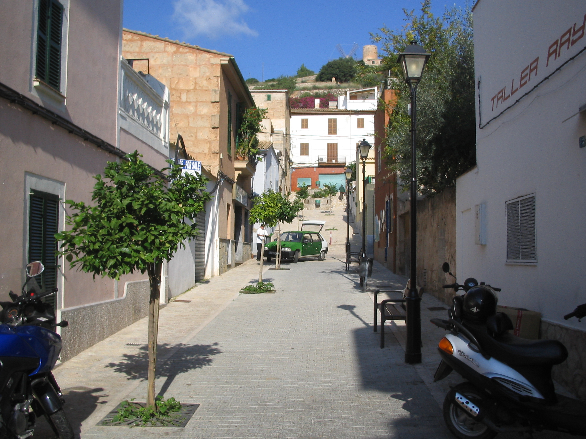 A spanish village called Andraitx in Palma de Mallorca.